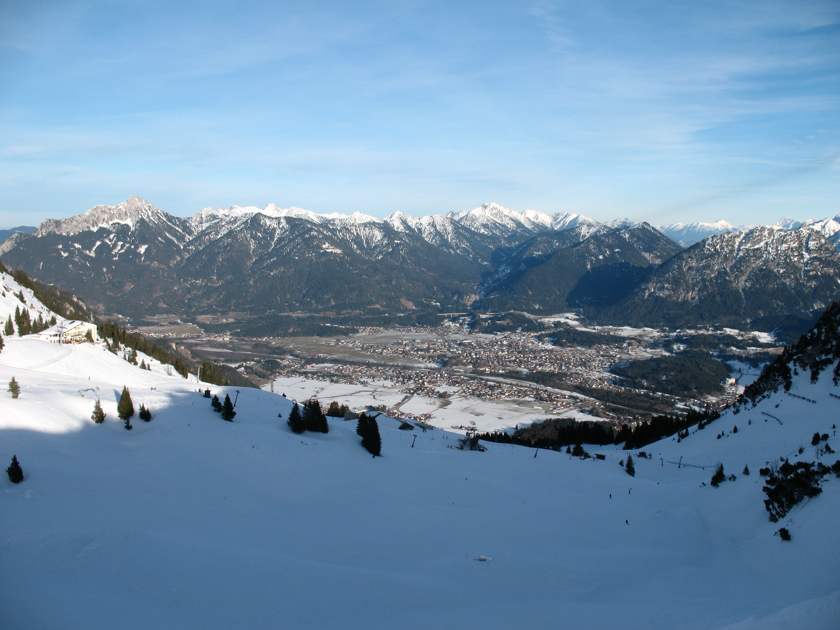 Reutte (853 m) vor den Ammergauer Alpen, gesehen vom Skigebiet Hahnenkamm Höfen.